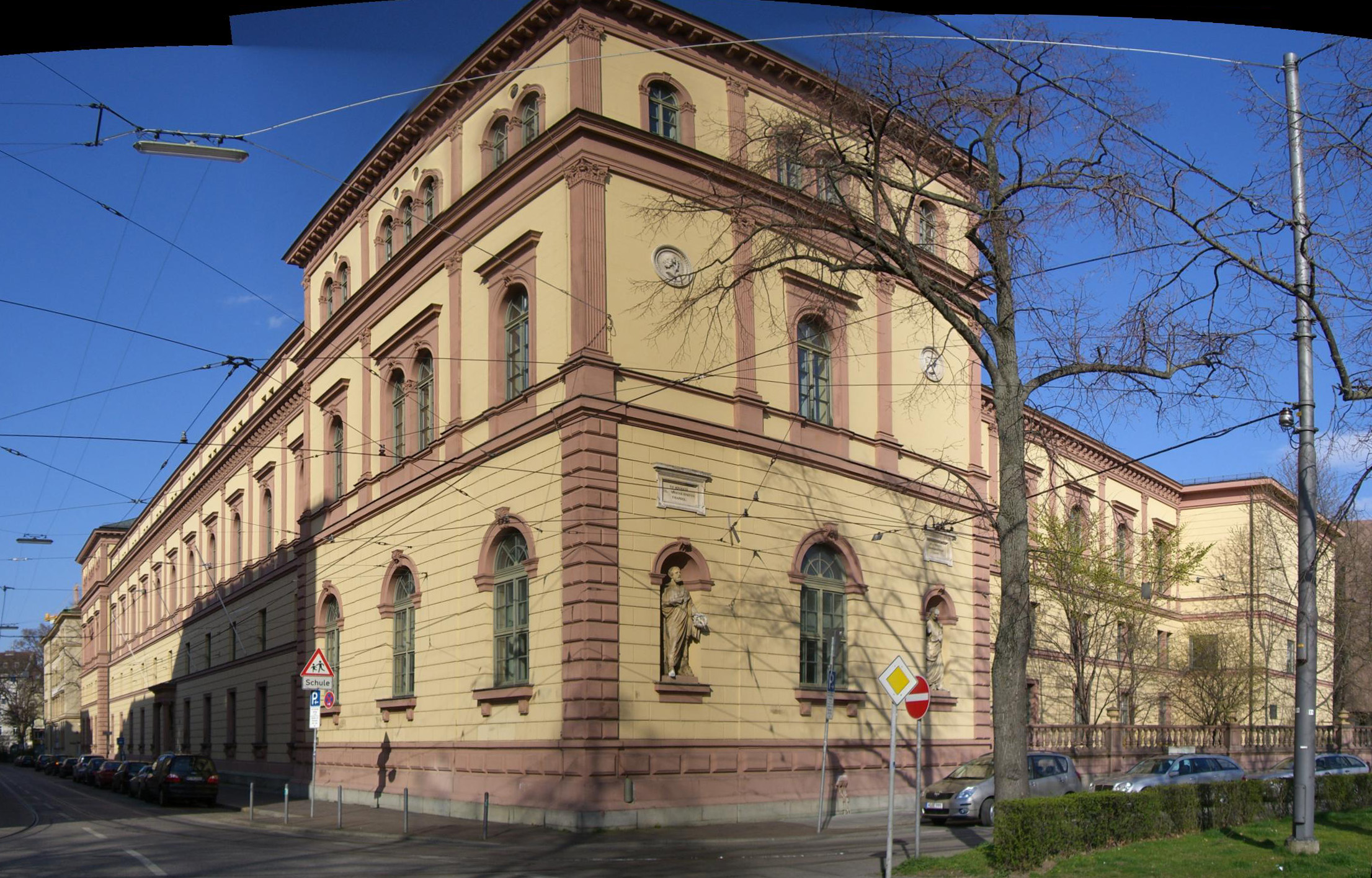 Wilhelmsgymnasium München (Eingang)